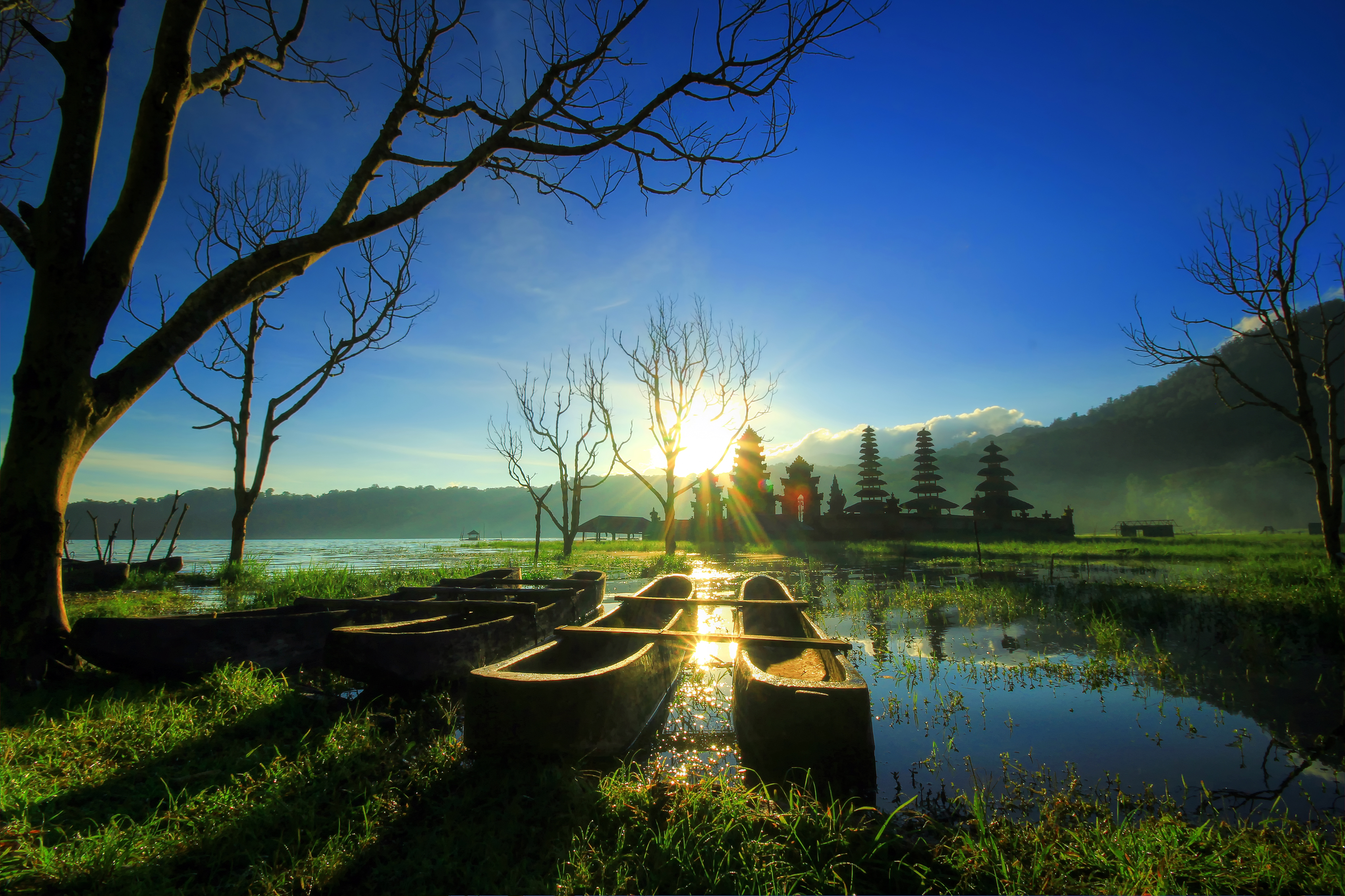 Danau tamblingan merupakan salah satu danau yang terletak di dataran tinggi bali.. danau ini memiliki sunrise yang sangat indah